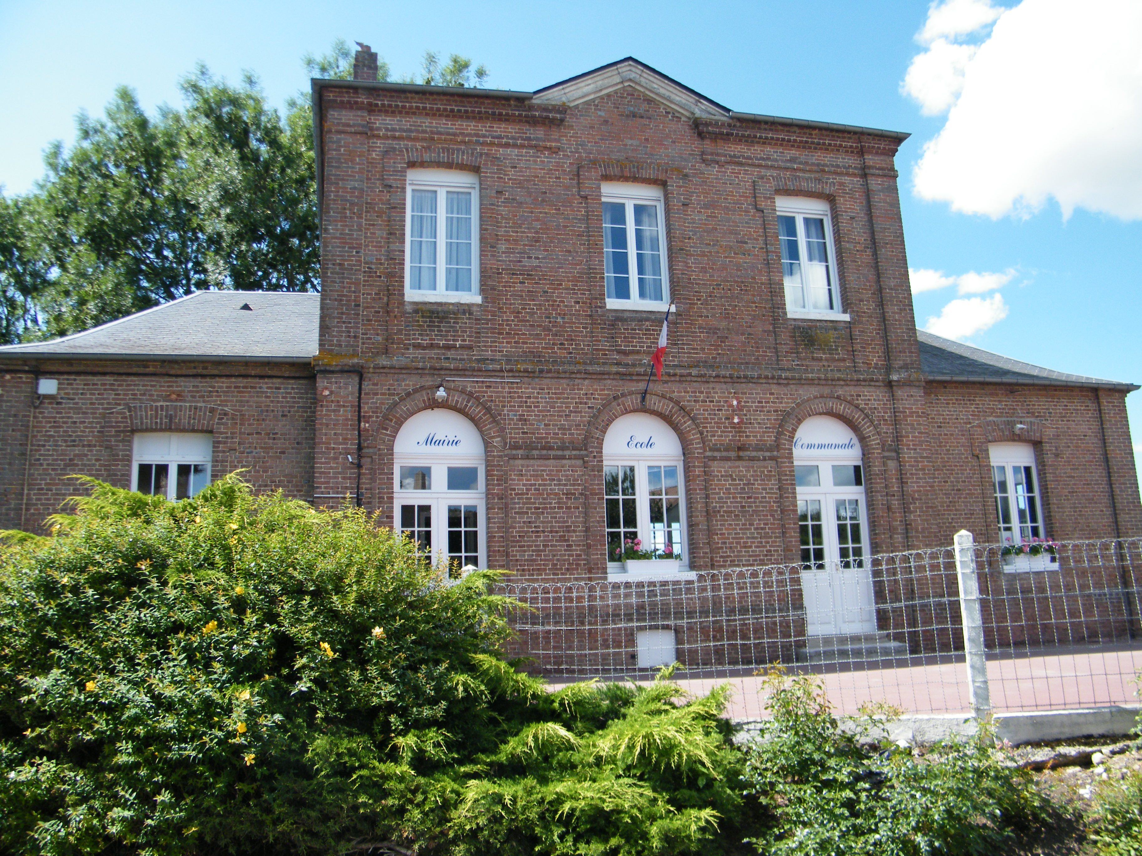 Fesque, Seine-Maritime, France, mairie-école